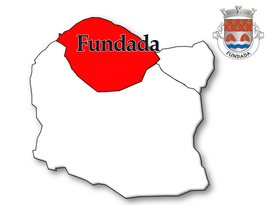 Evolução da População